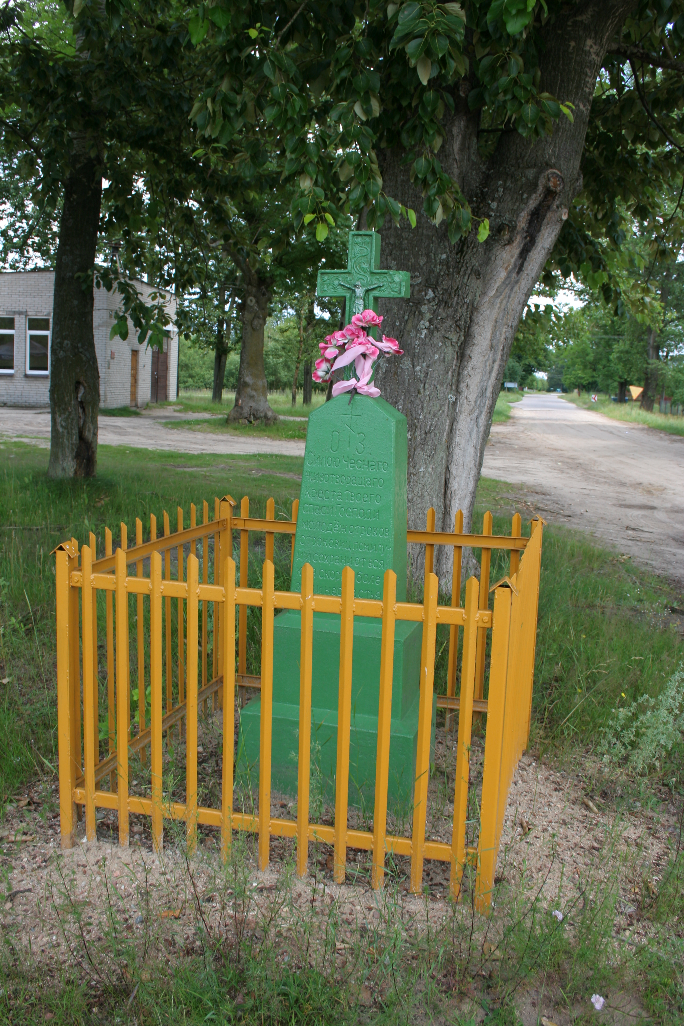 Krzyż przydrożny w Rogaczach.